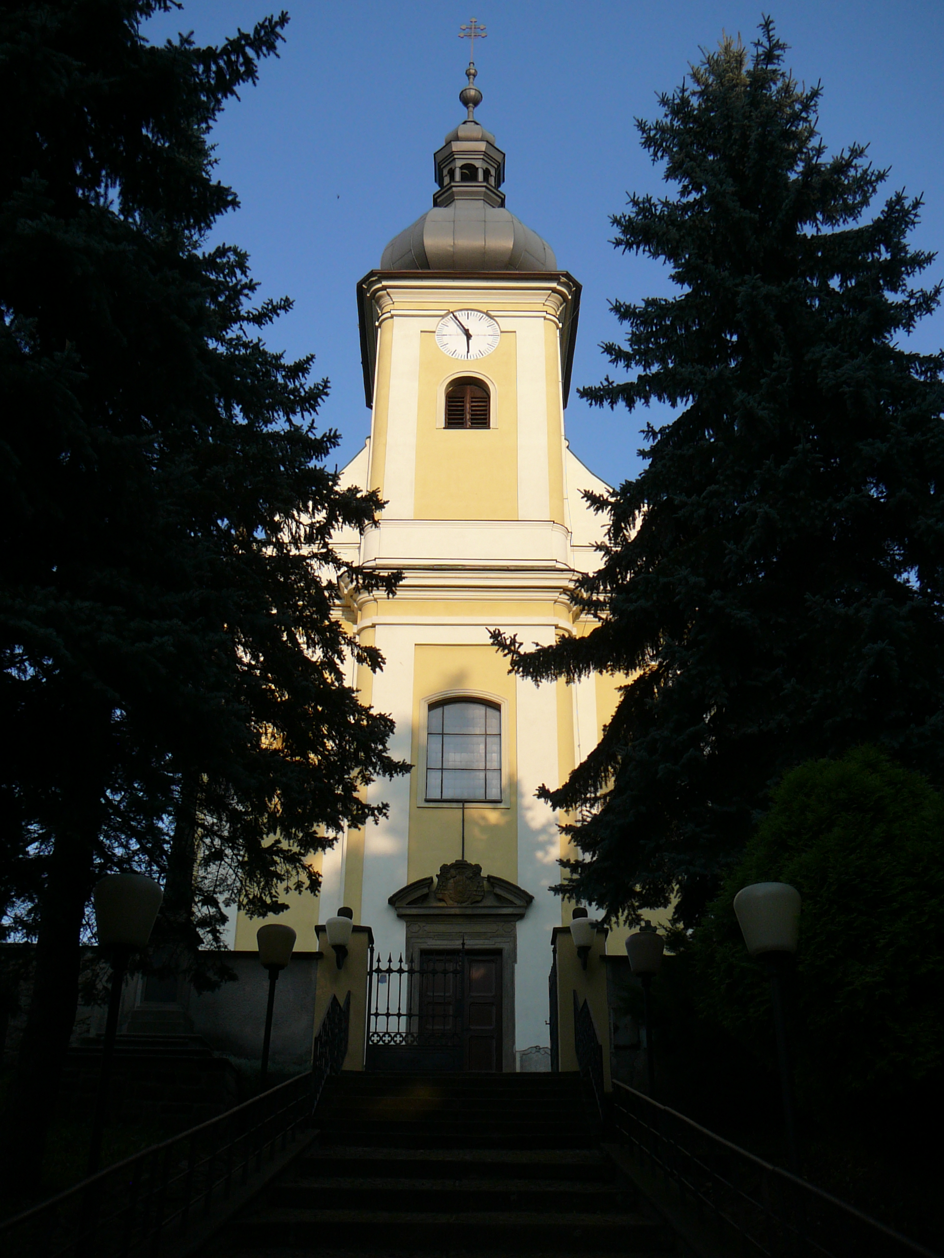 Kostel svatého Mikuláše, Rychaltice.